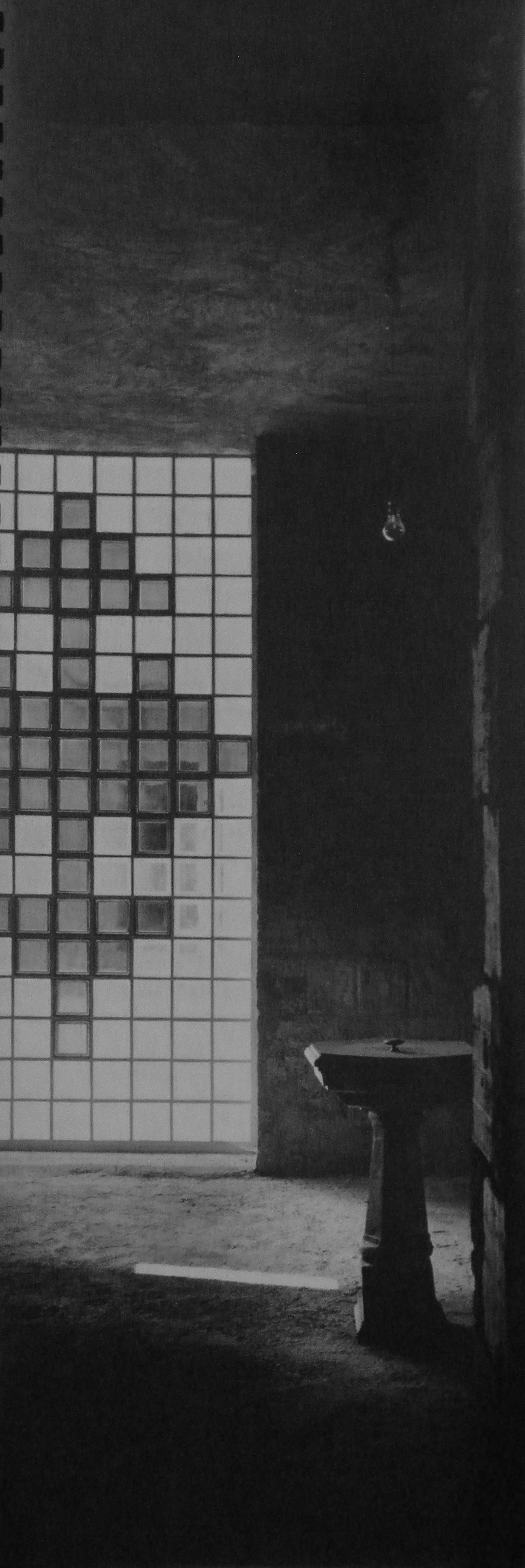 Battistero della Chiesa di San Gabriele Arcangelo in Mater Dei.